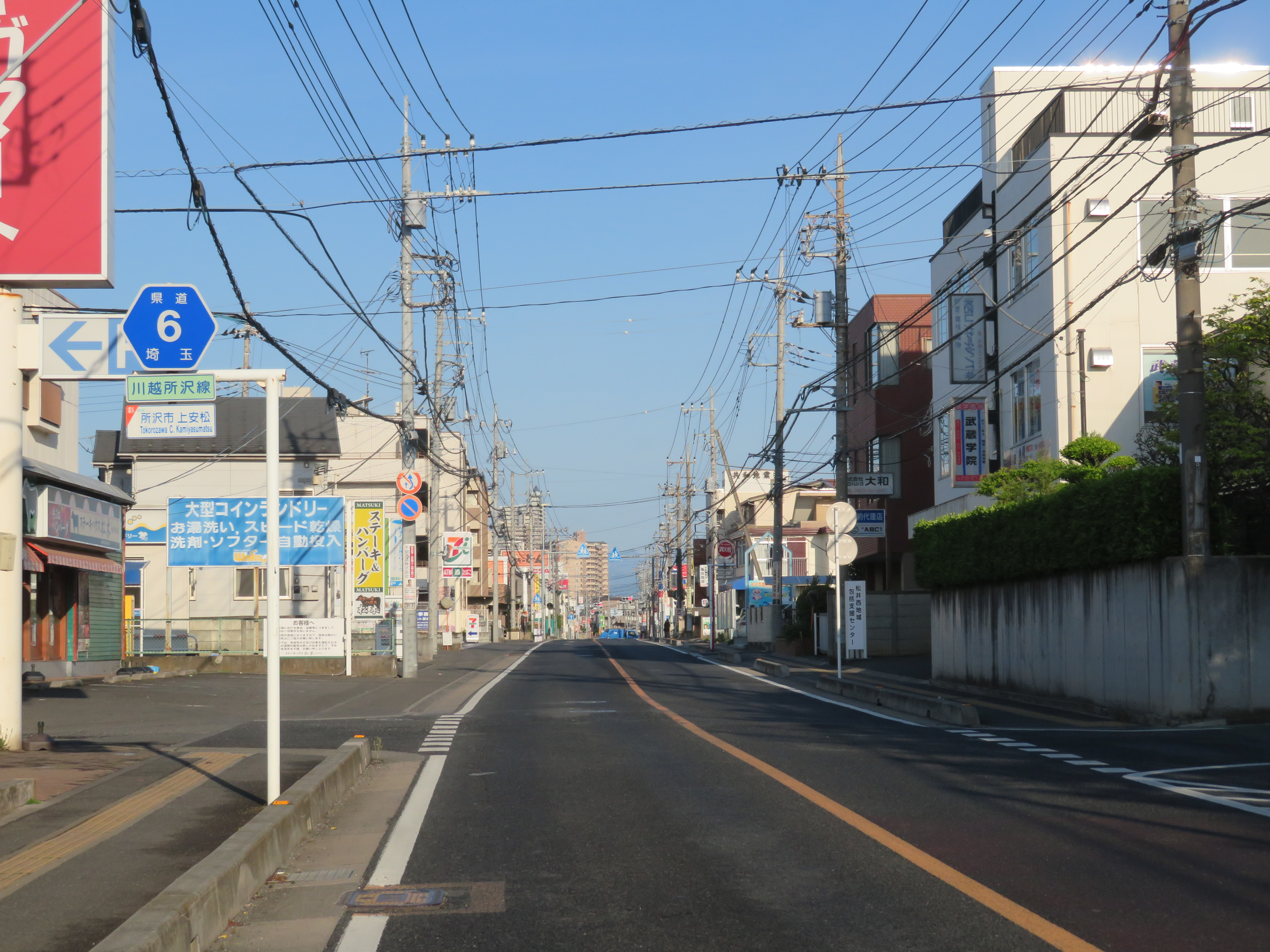 埼玉県道6号線所沢市上安松付近（所沢駅方面を撮影） Canon PowerShot SX720 HS